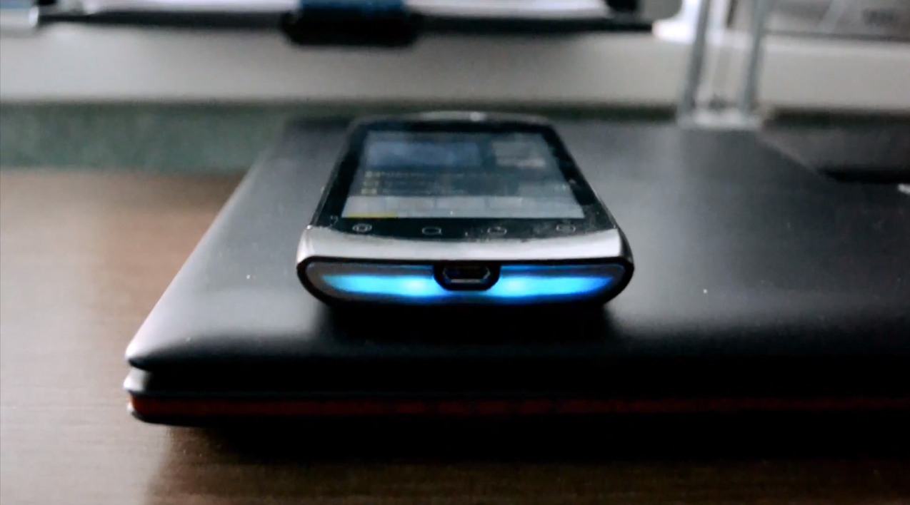 Подсветка или "светомузыка" - отличительная особенность смартфона Highscreen Cosmo